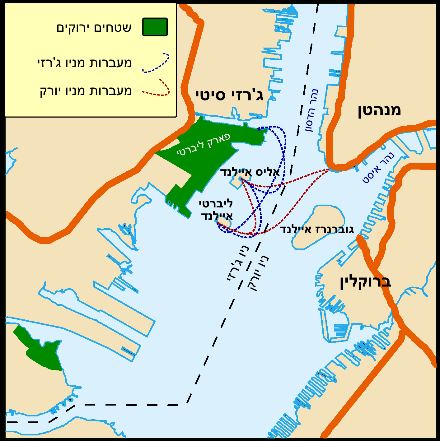 מיקום פסל החירות-עברית